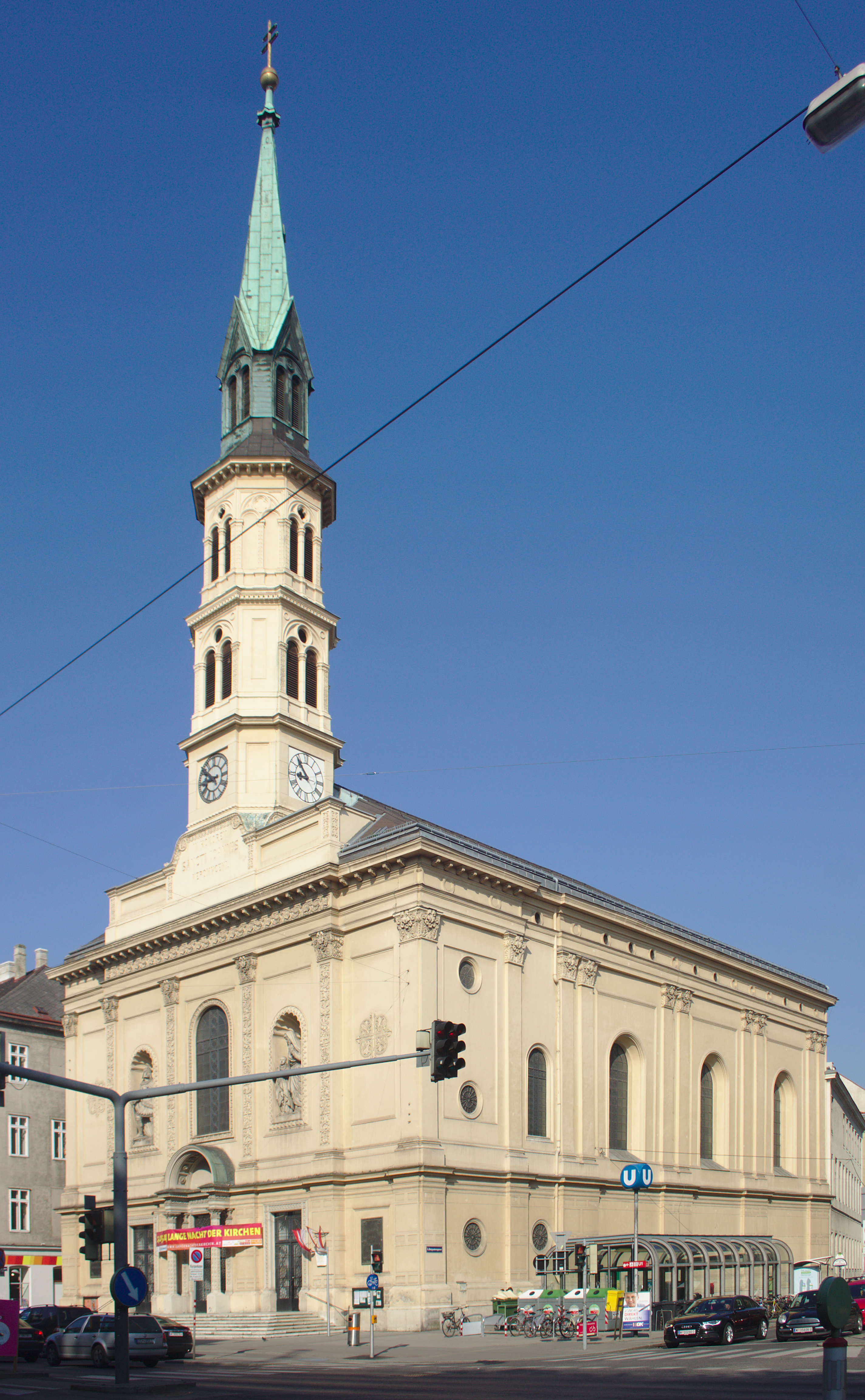 Kath. Pfarrkirche, hl Johannes Nepomuk